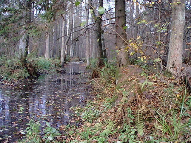 Rzeka Łutownia w Szczekotowie